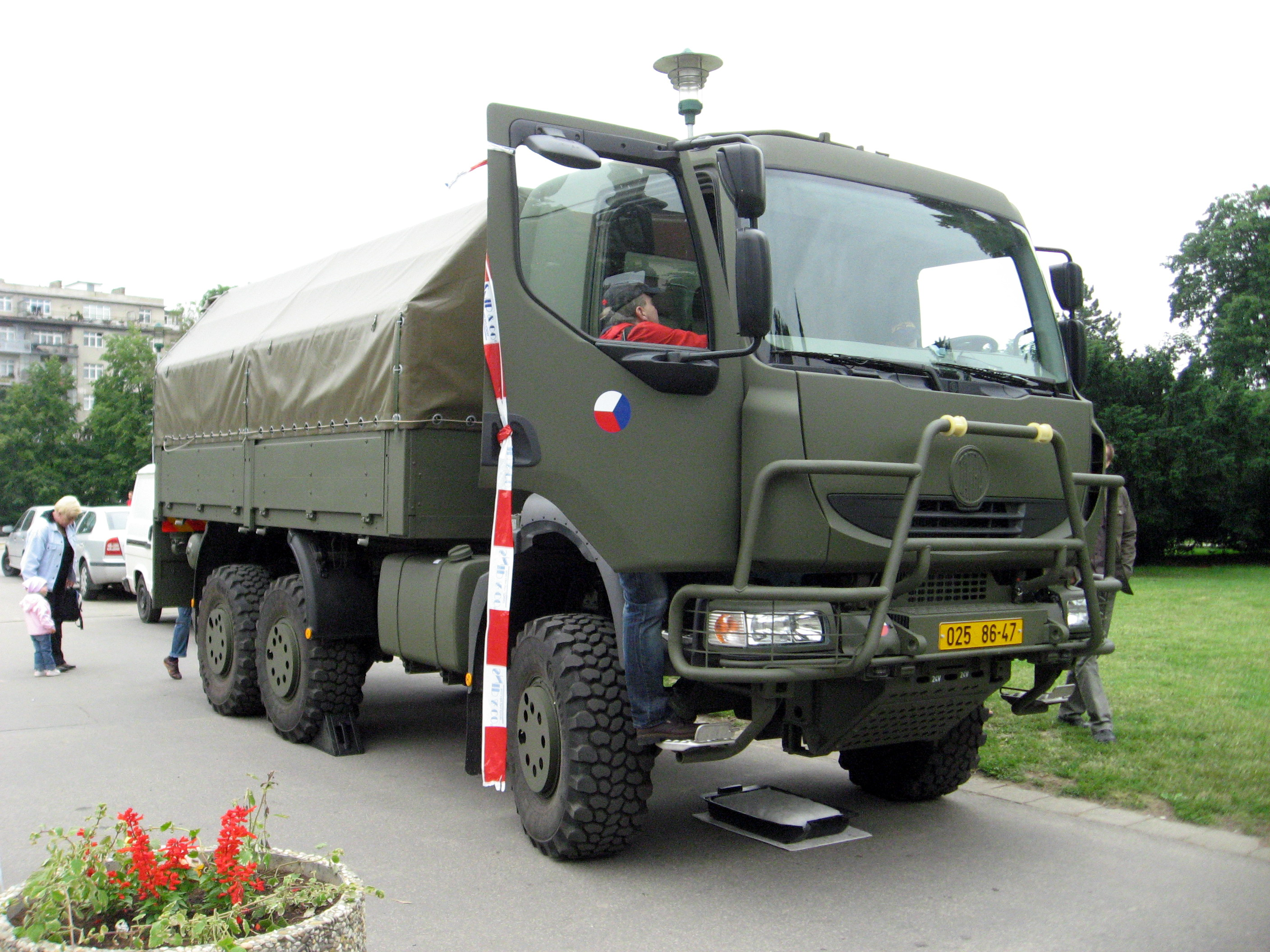 Vojenská Tatrovka na Moraváku